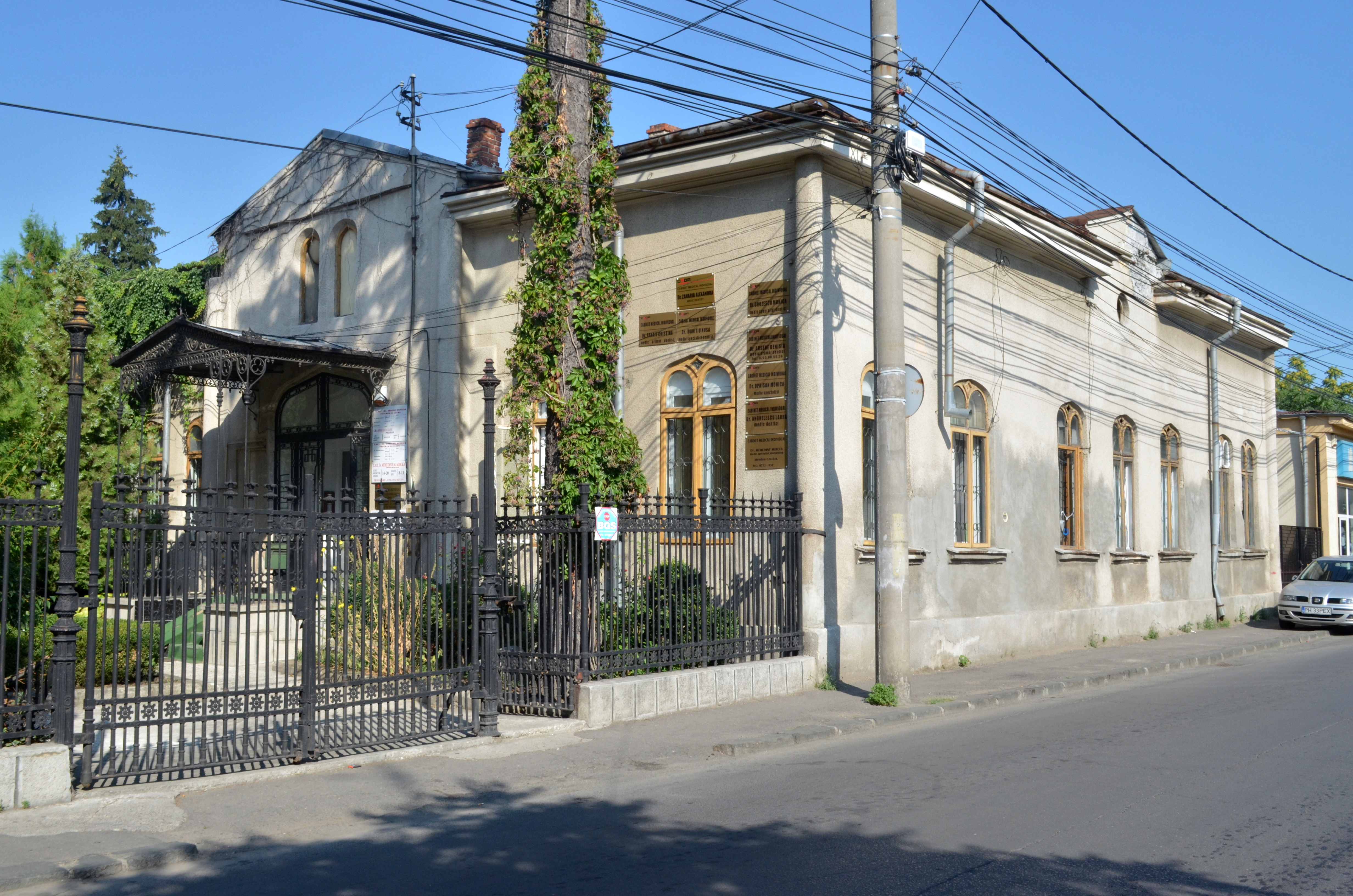 Casa N. Pârvulescu, Str. Romană nr. 35, Ploiești